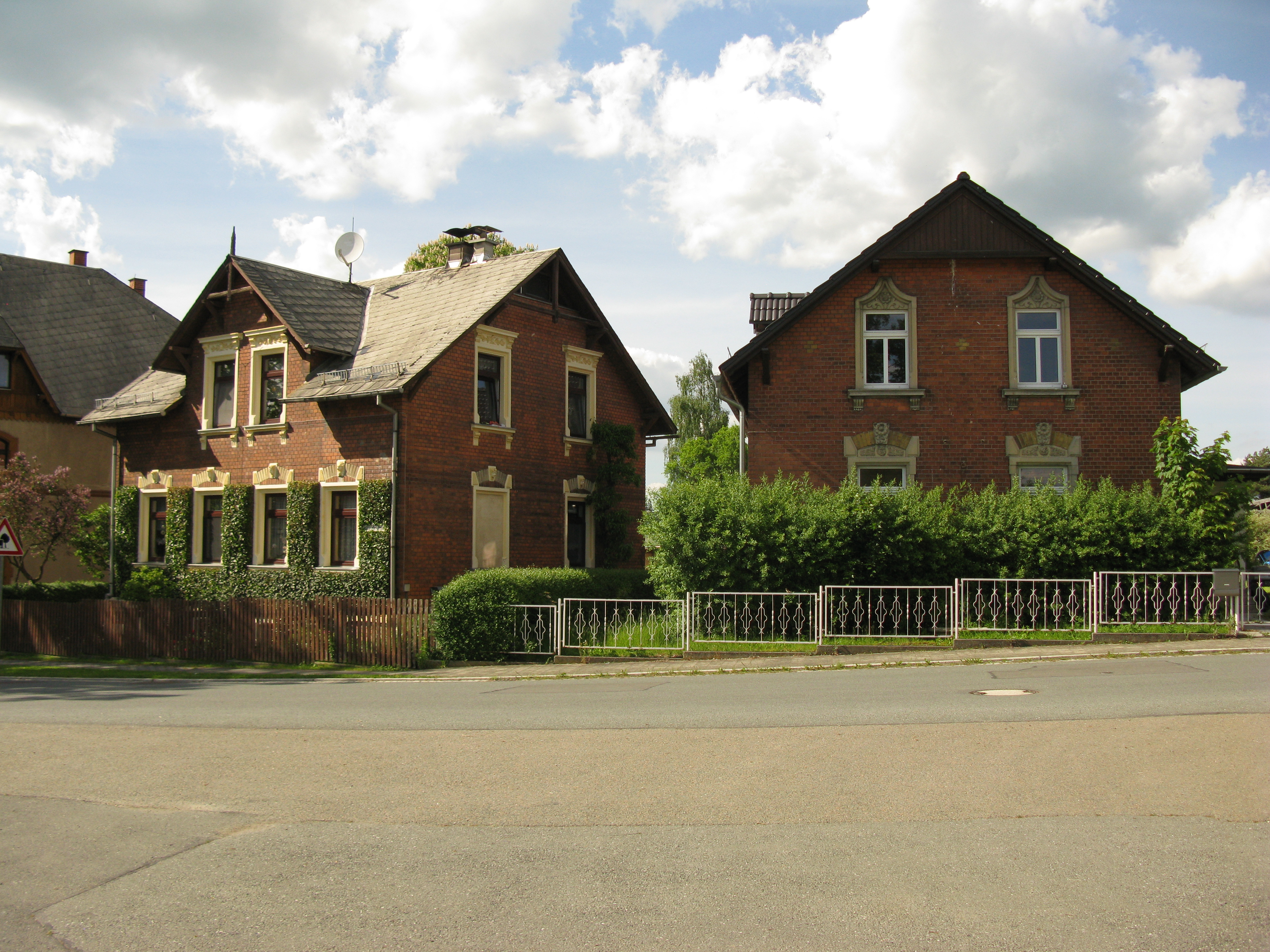 Rosenbach/Vogtl., Ortsteil Schönberg: Denkmalgeschützte Häuser "Am Bahnhof 7" (Sächsische Denkmal-ID:09232011) - rechts und "Mühltroffer Straße 1" (Sächsische Denkmal-ID:09232010) - links